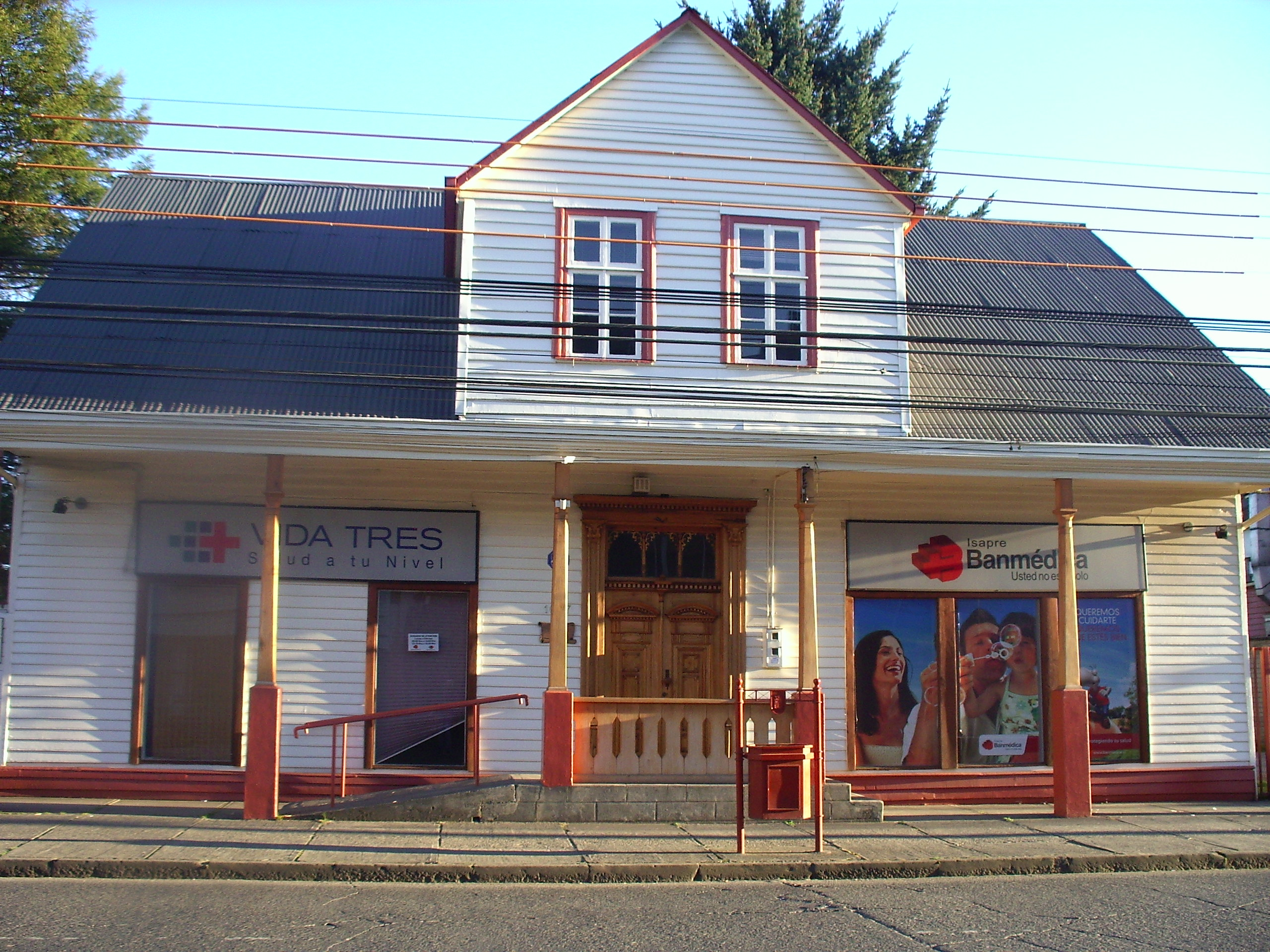 Casa de Germán Stückrath This is a photo of a national monument in Chile: 716